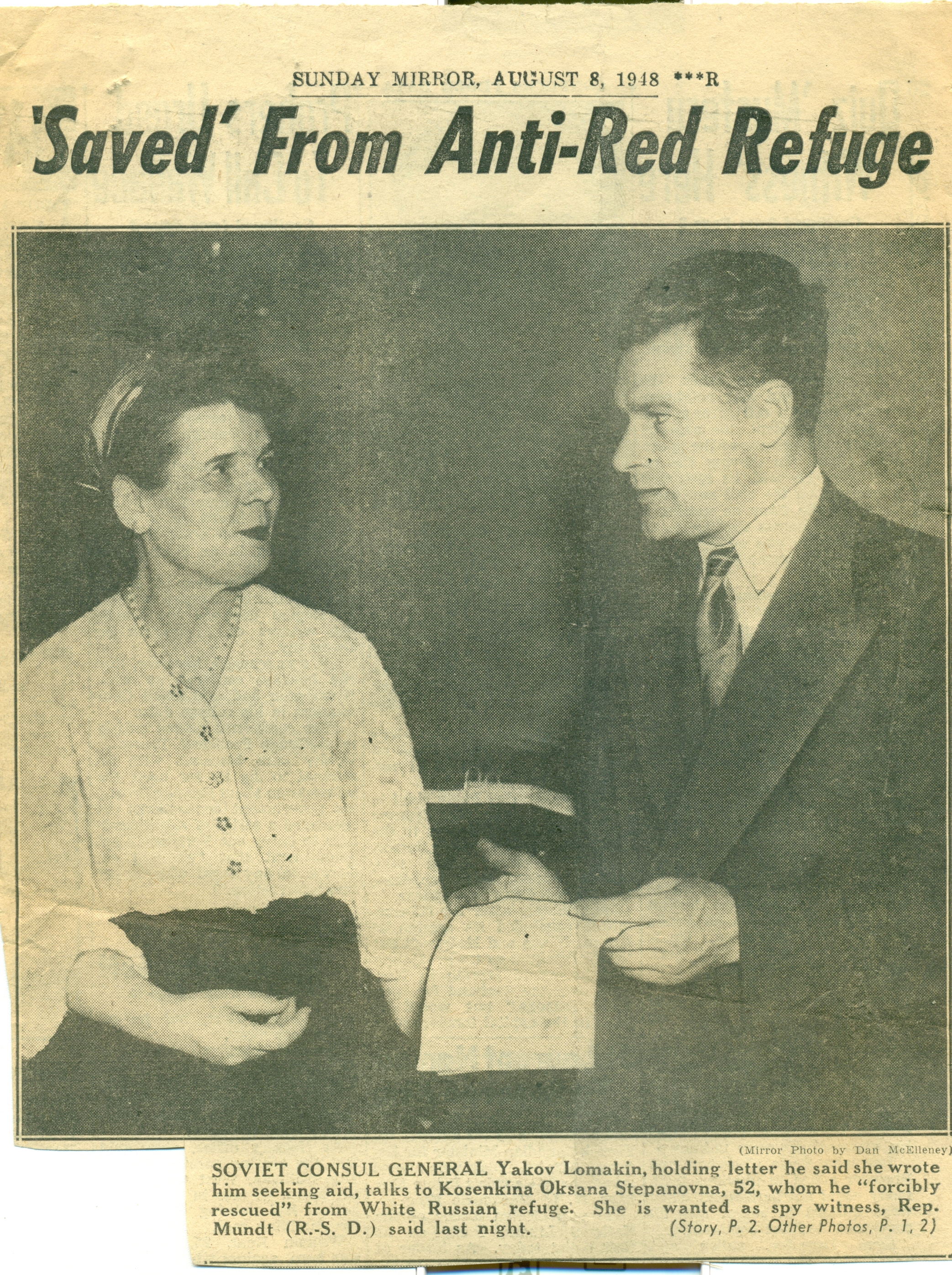 Soviet Consul General Yakov Lomakin holding letter from Kasenkina Oksana Stepanovna